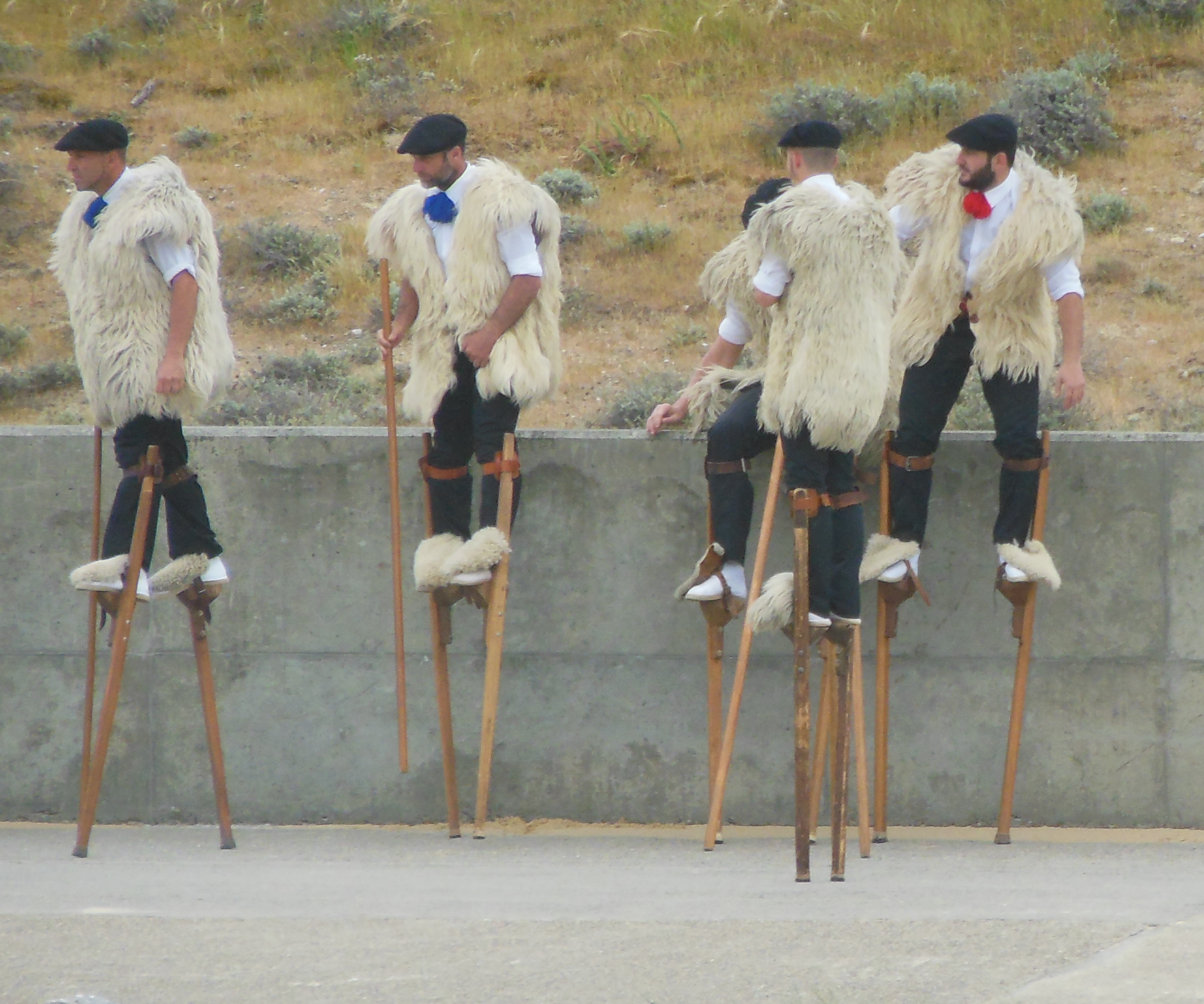 Échassiers landais lors de la Fête de la Mer, à Mimizan (Landes, France)